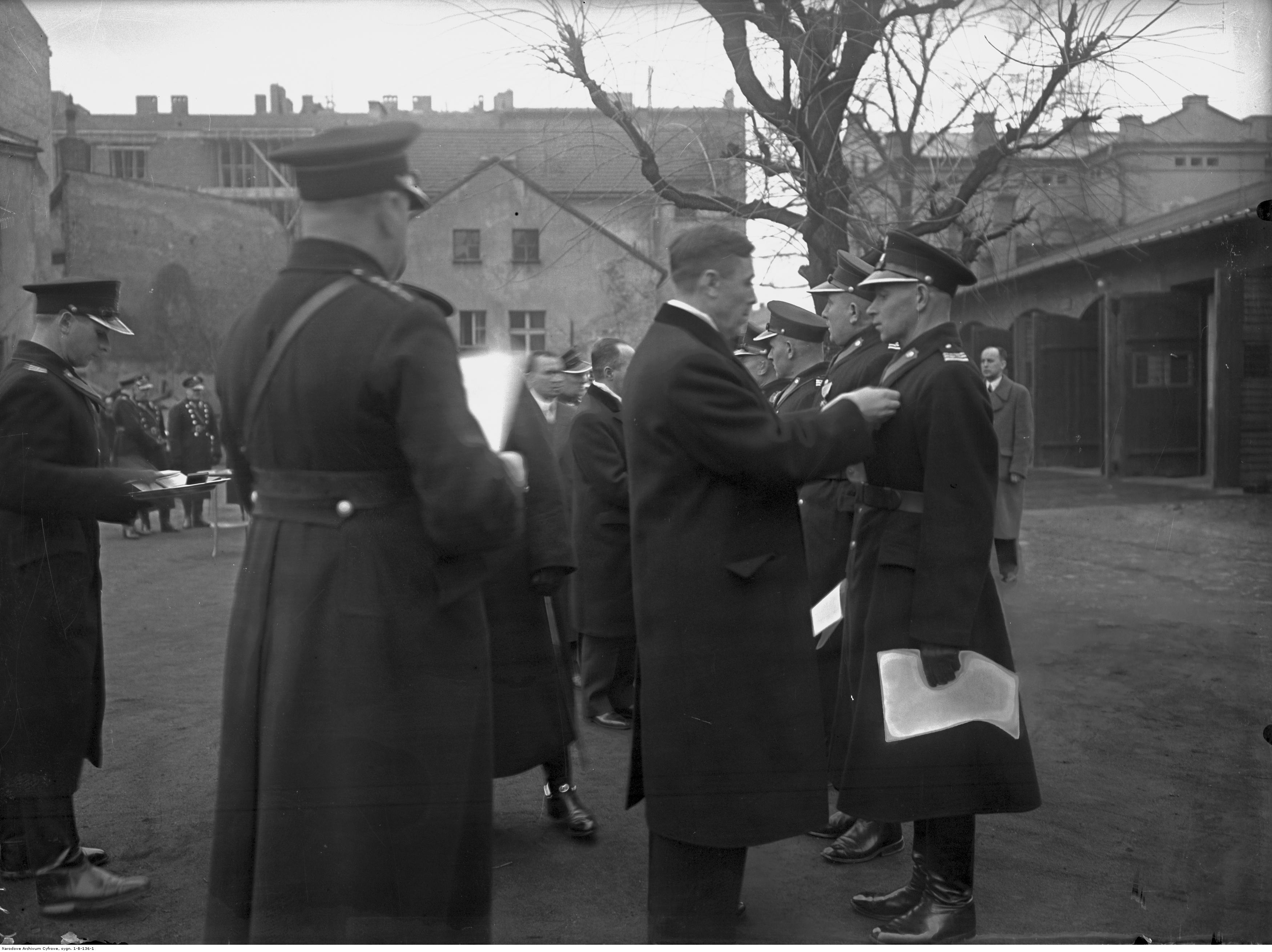 Obchody Święta Policji Państwowej w Krakowie. Wręczenie odznaczeń państwowych zasłużonym policjantom przez wojewodę krakowskiego Józefa Tymińskiego. Koncern Ilustrowany Kurier Codzienny - Archiwum Ilustracji. Sygnatura: 1-B-136-1